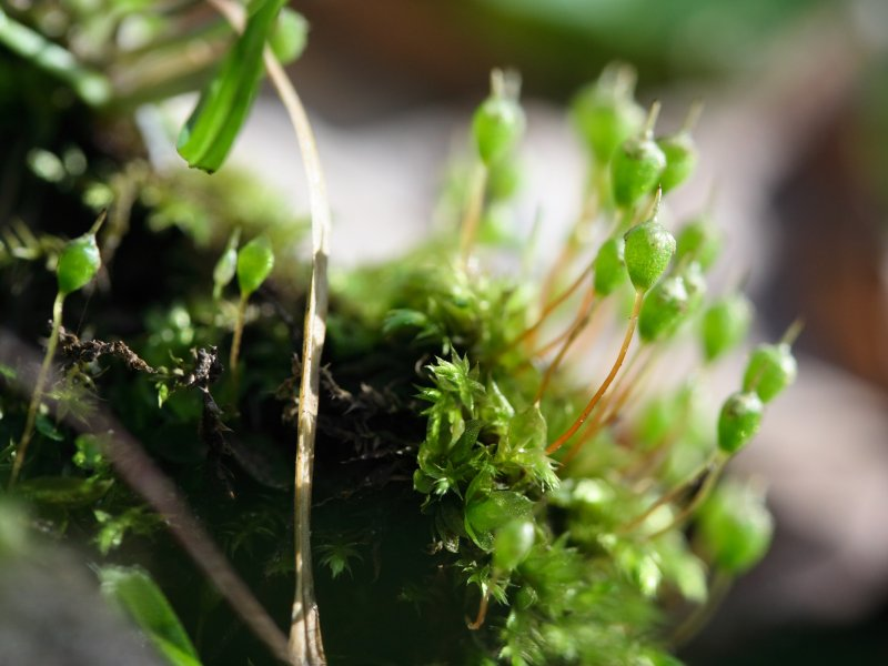 Birnförmiges Blasenmützenmoos (Physcomitrium pyriforme), Habitus